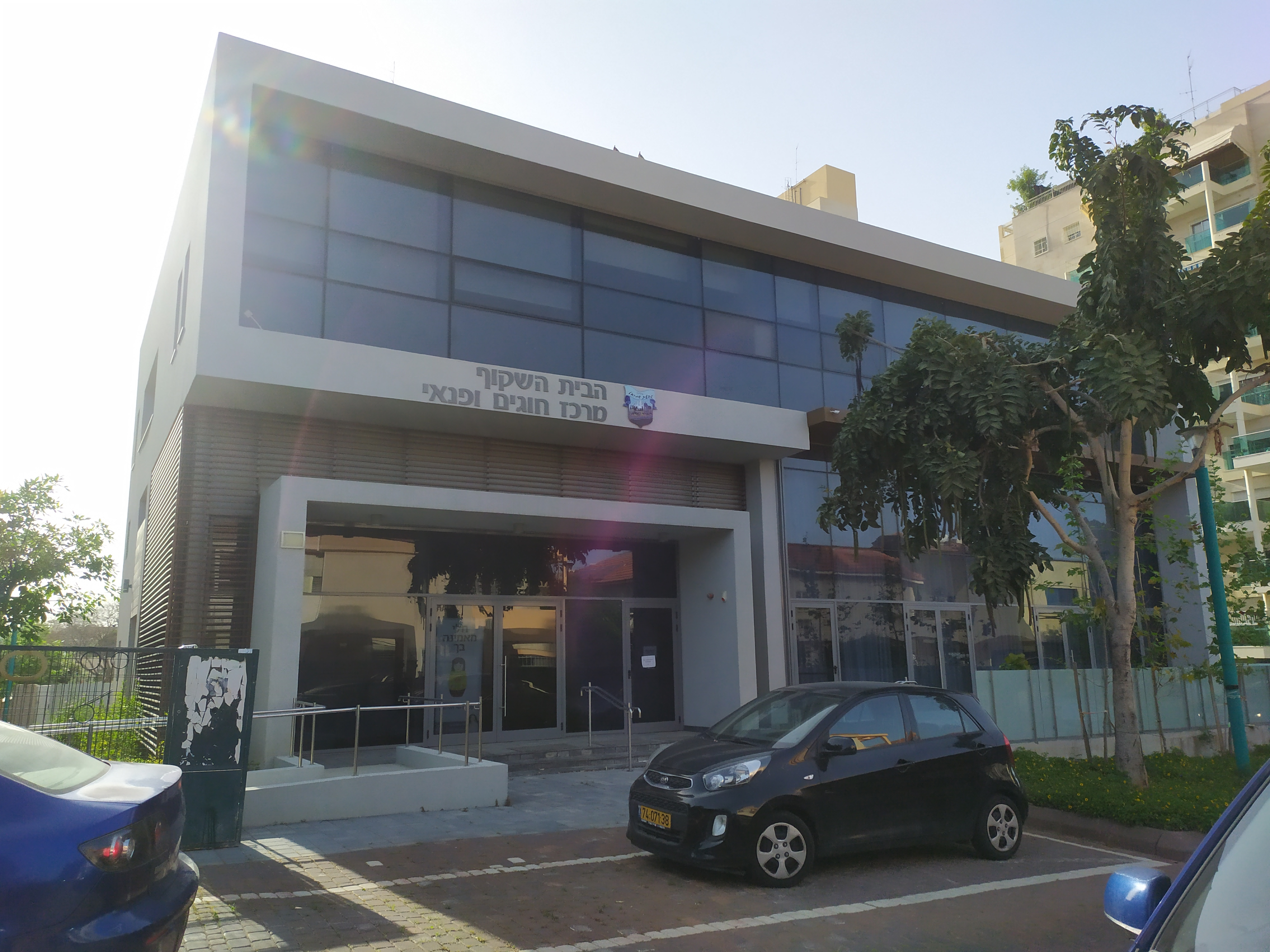 הבית השקוף - שלוחת המתנס ברמת הדר